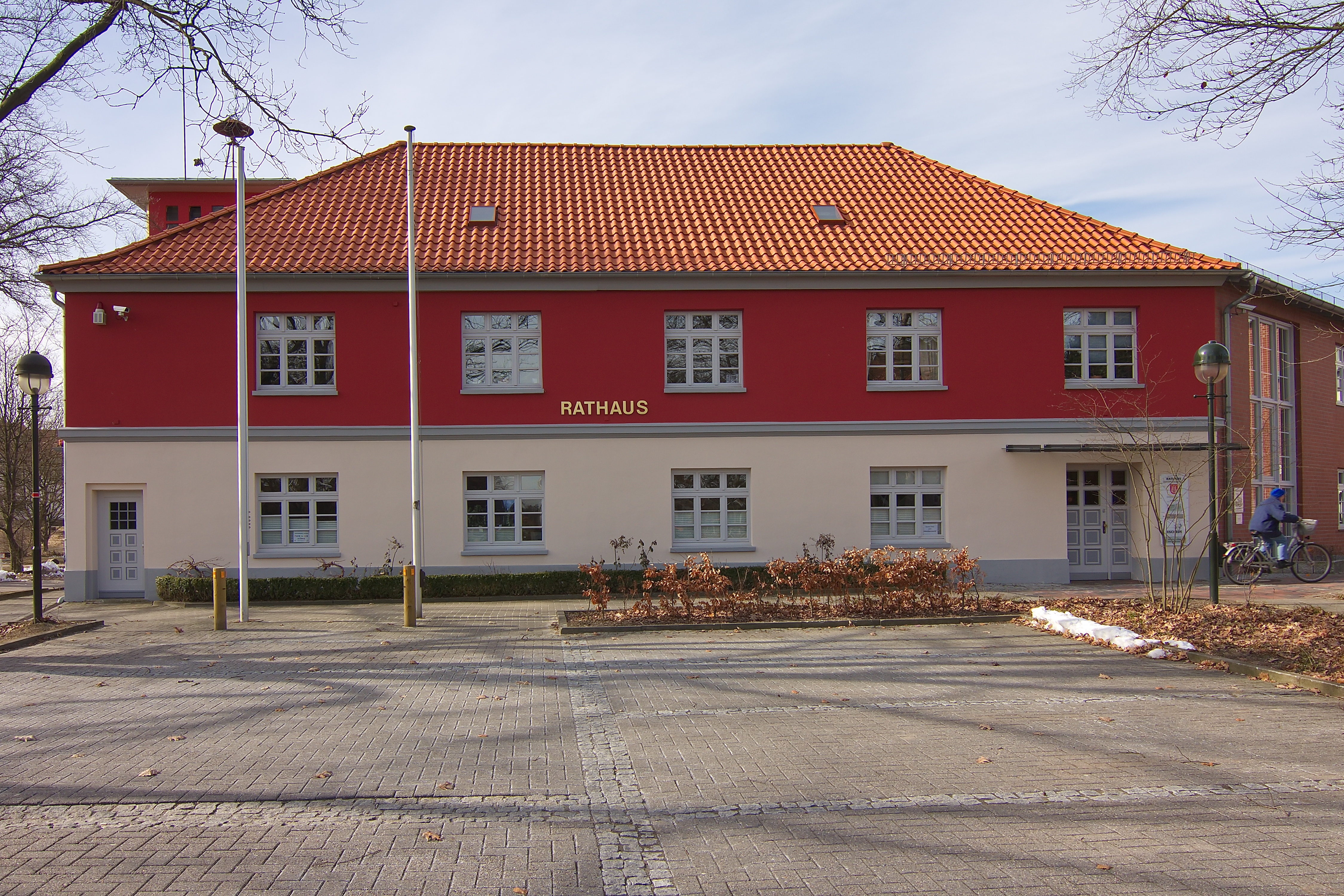 Eschede in Niedersachsen, Deutschland